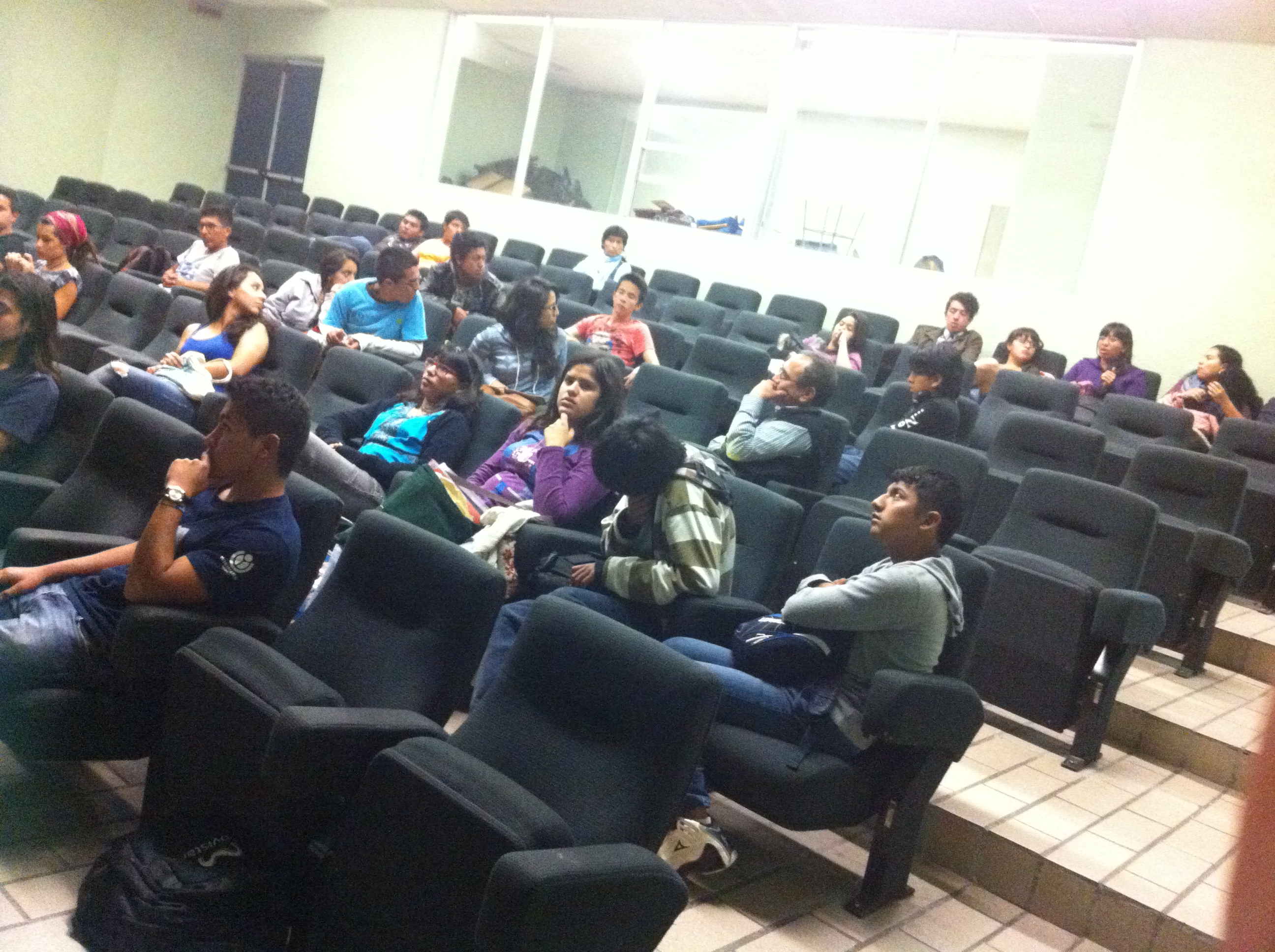 Auditorio del Siladin, CCH.